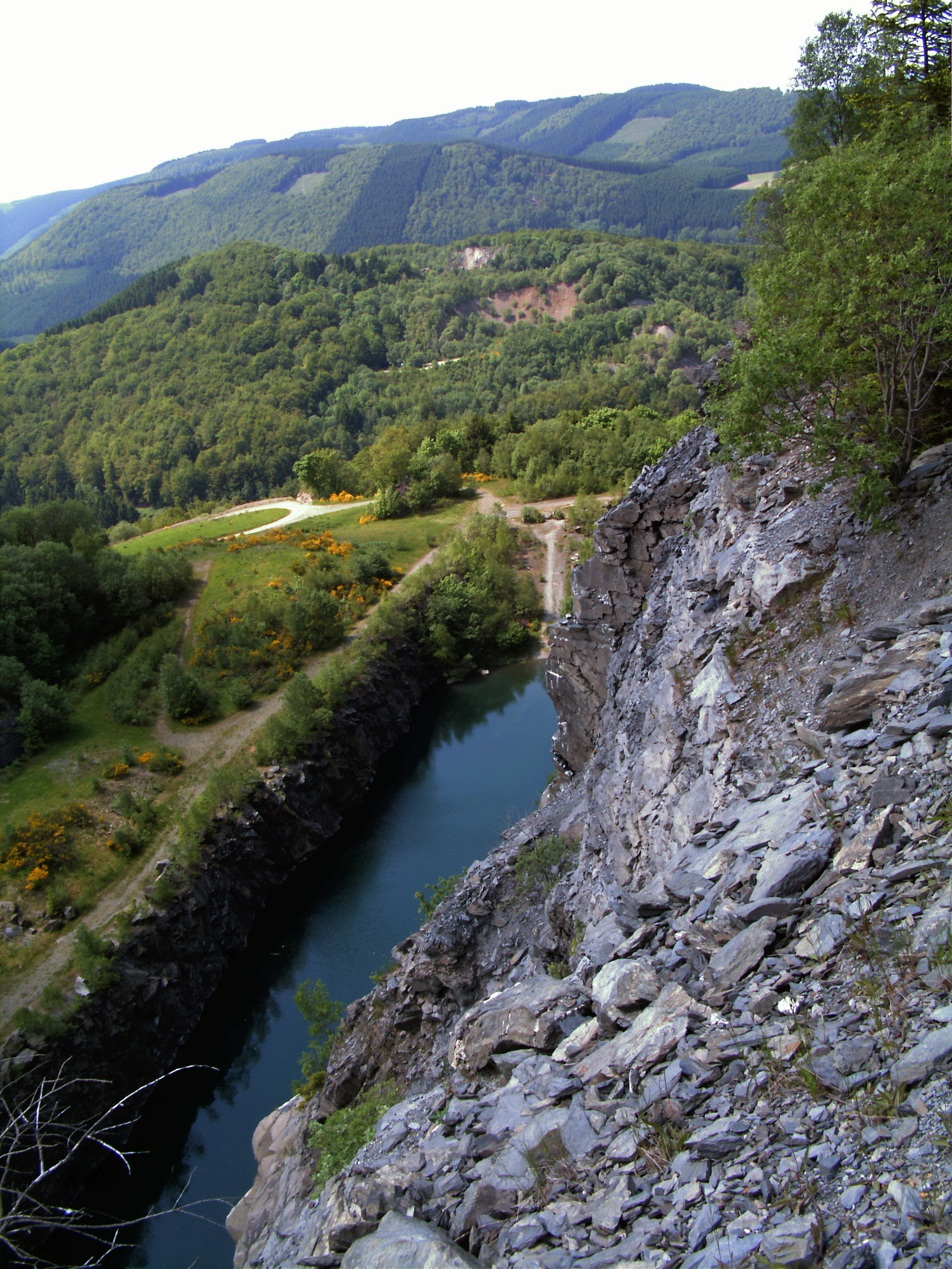 Blick vom NSG Iberg zum Meisterstein; Felsbereich gehört noch zu NSG, Steinbruchsee liegt im LSG Winterberg.